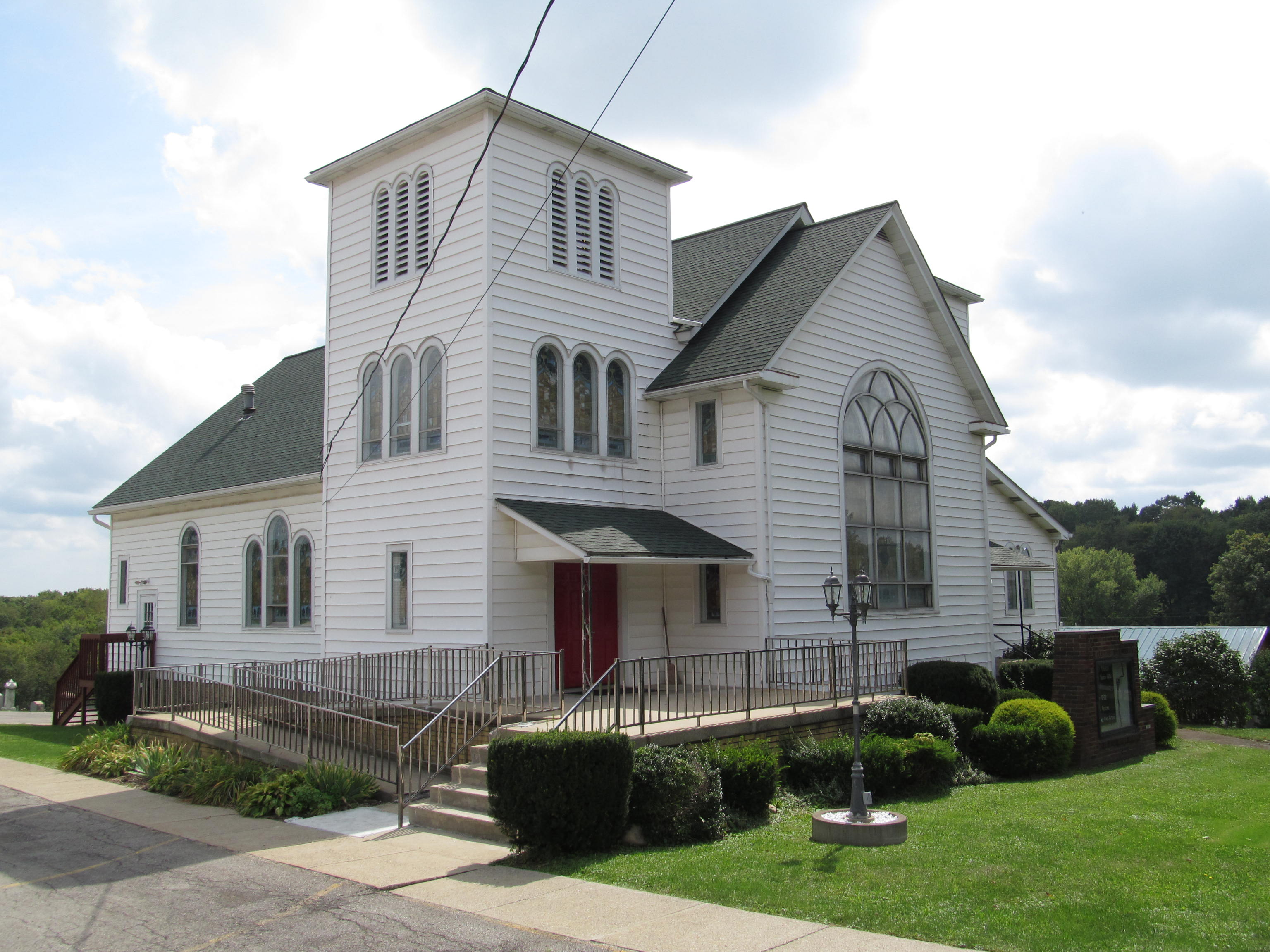 Cowansville, Pennsylvania